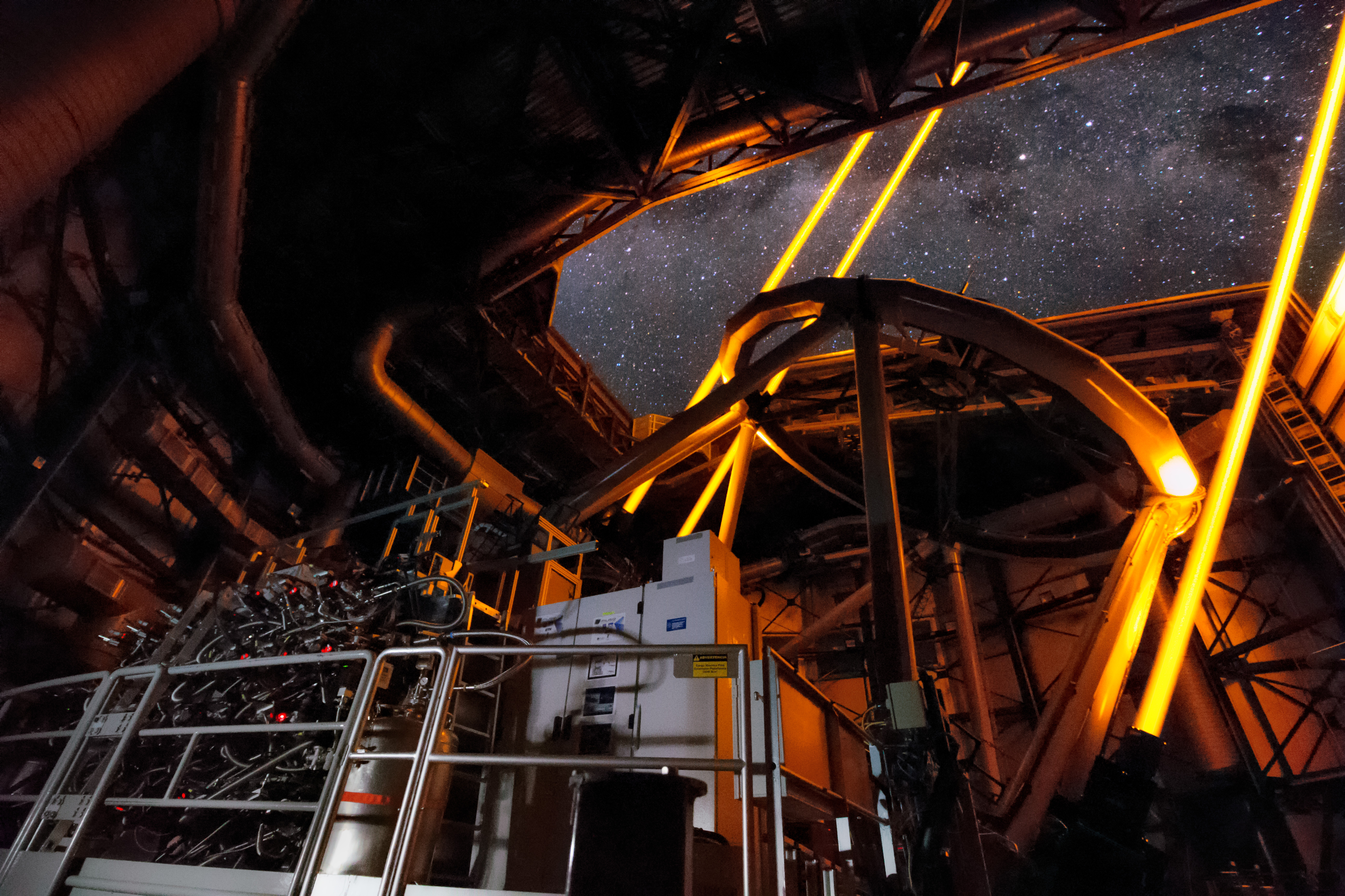 Vue de l'instrument MUSE au VLT en présence du systèmes d'optique adaptative et des étoiles lasers